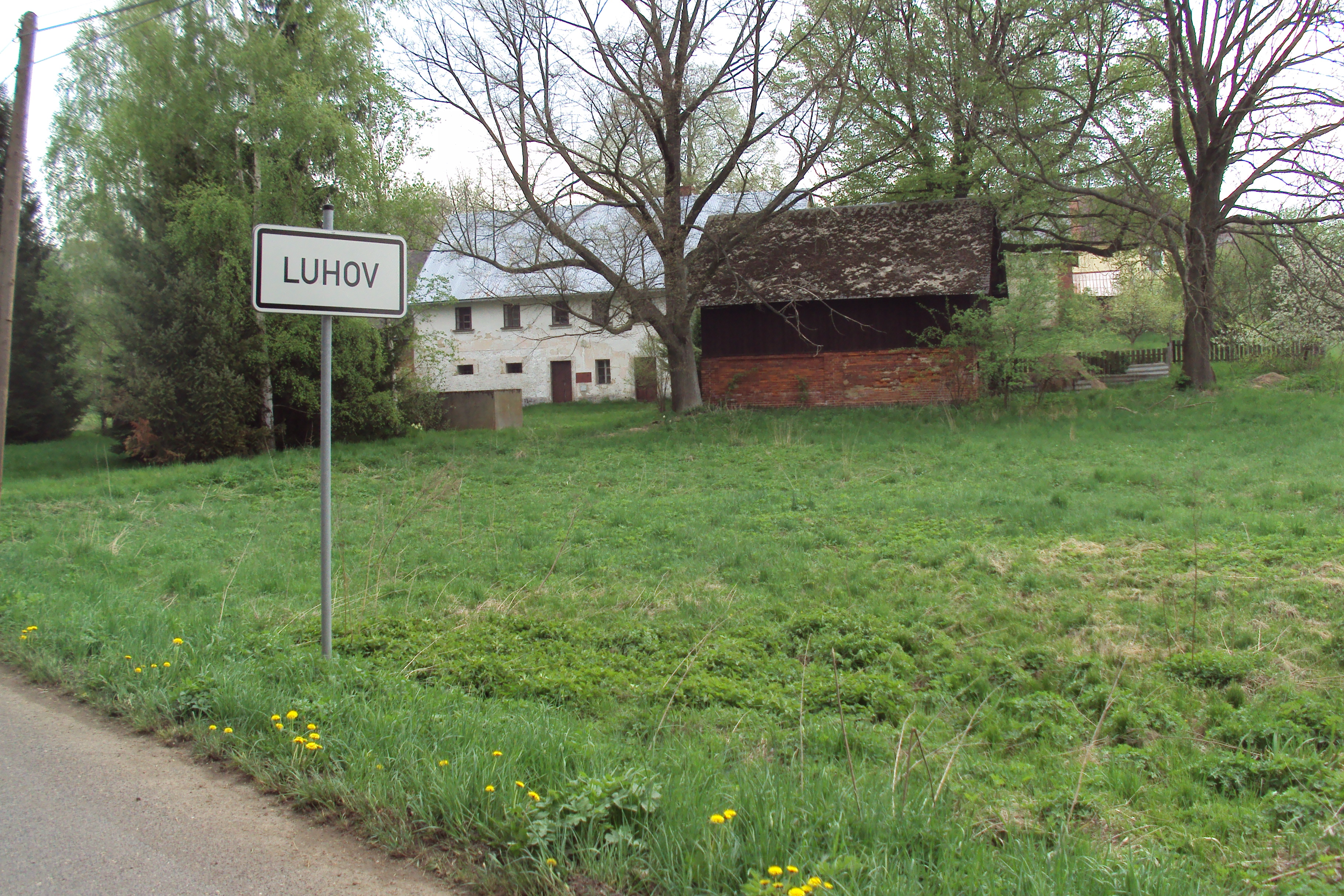 Obec Luhov patří pod obec Brniště na Českolipsku